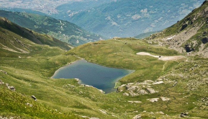 Црното Езеро на Шара